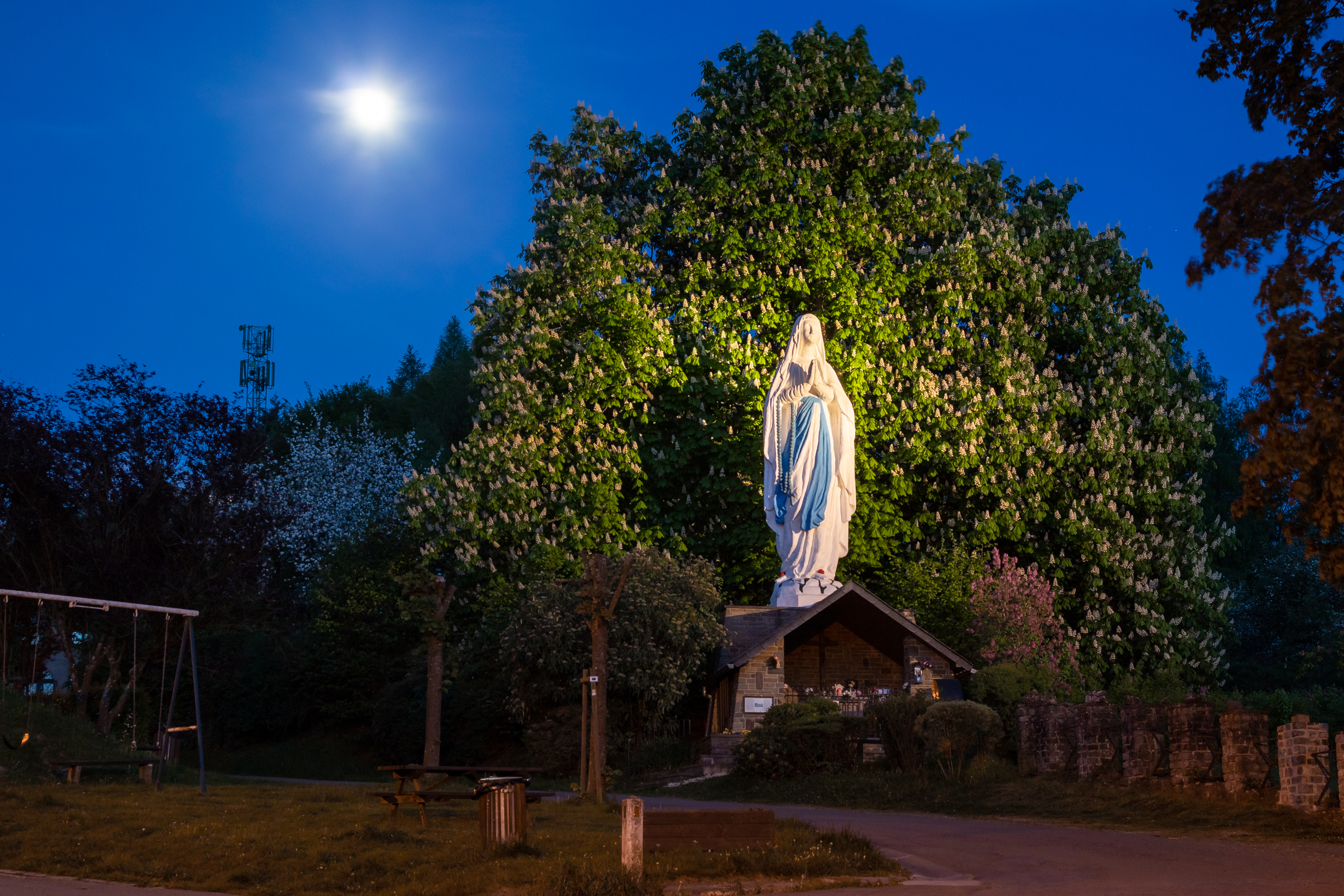 Marienstatue "La Vierge de Werpin" in Werpin